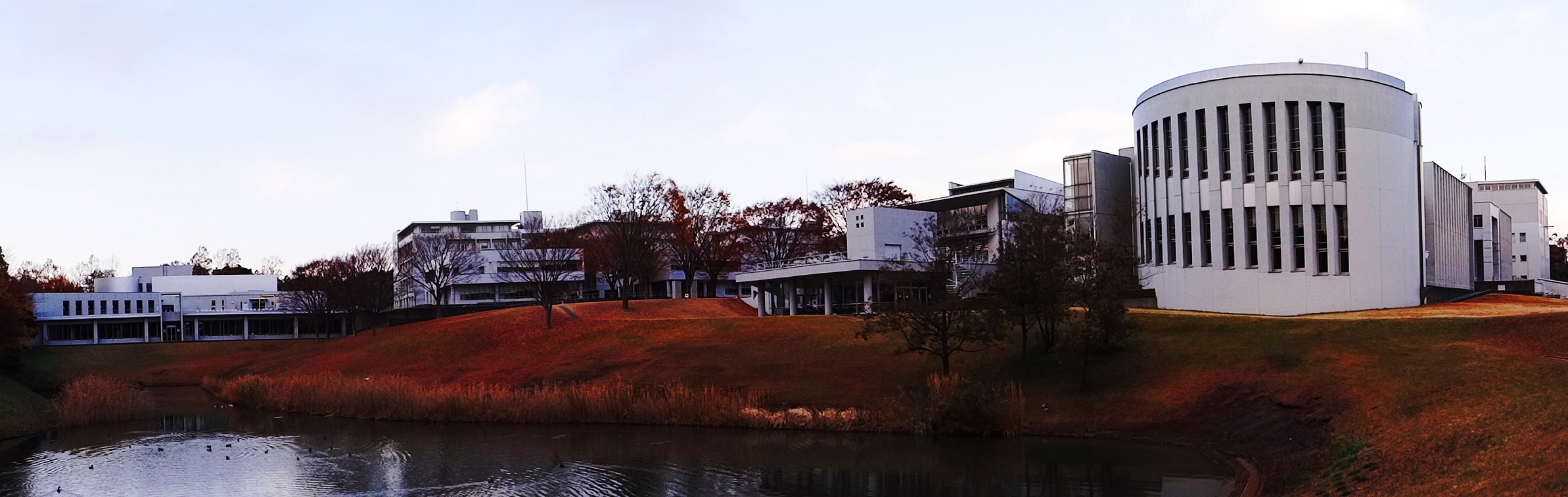 Keio University SFC